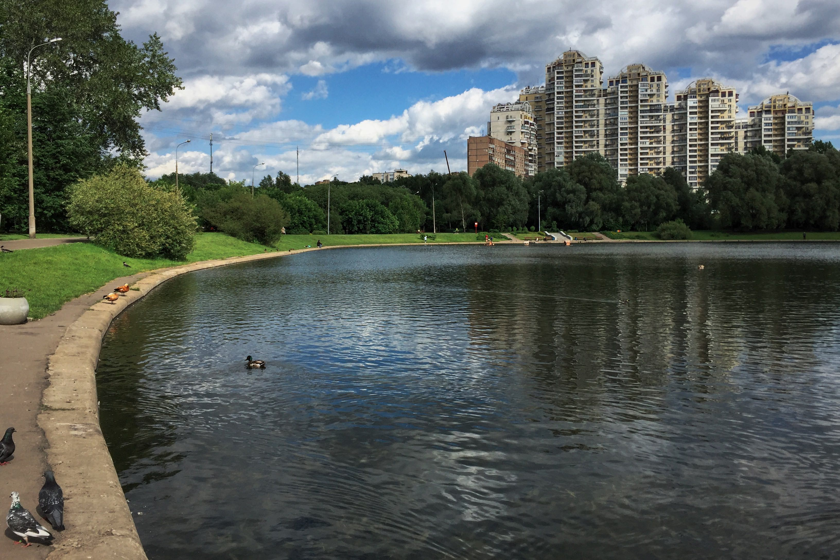 Улица Улофа Пальме. Мосфильмовский пруд. "Депутатский дом"